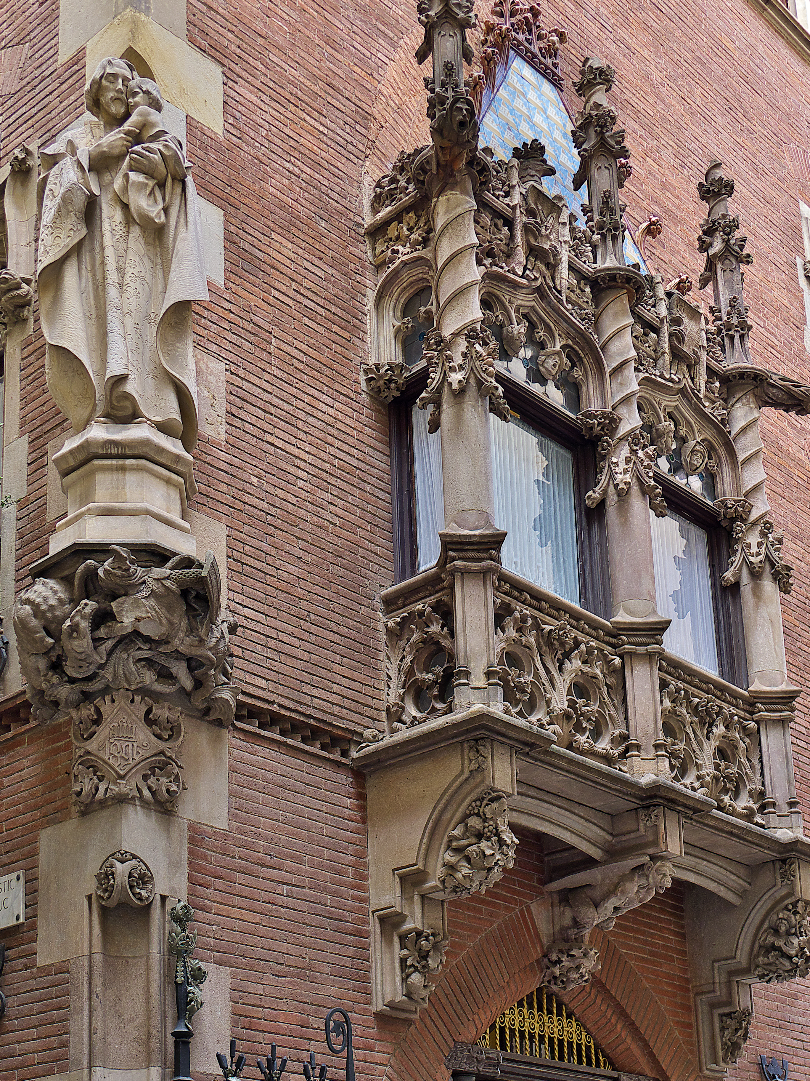 Una obra de José Puig Cadafalch (1896)